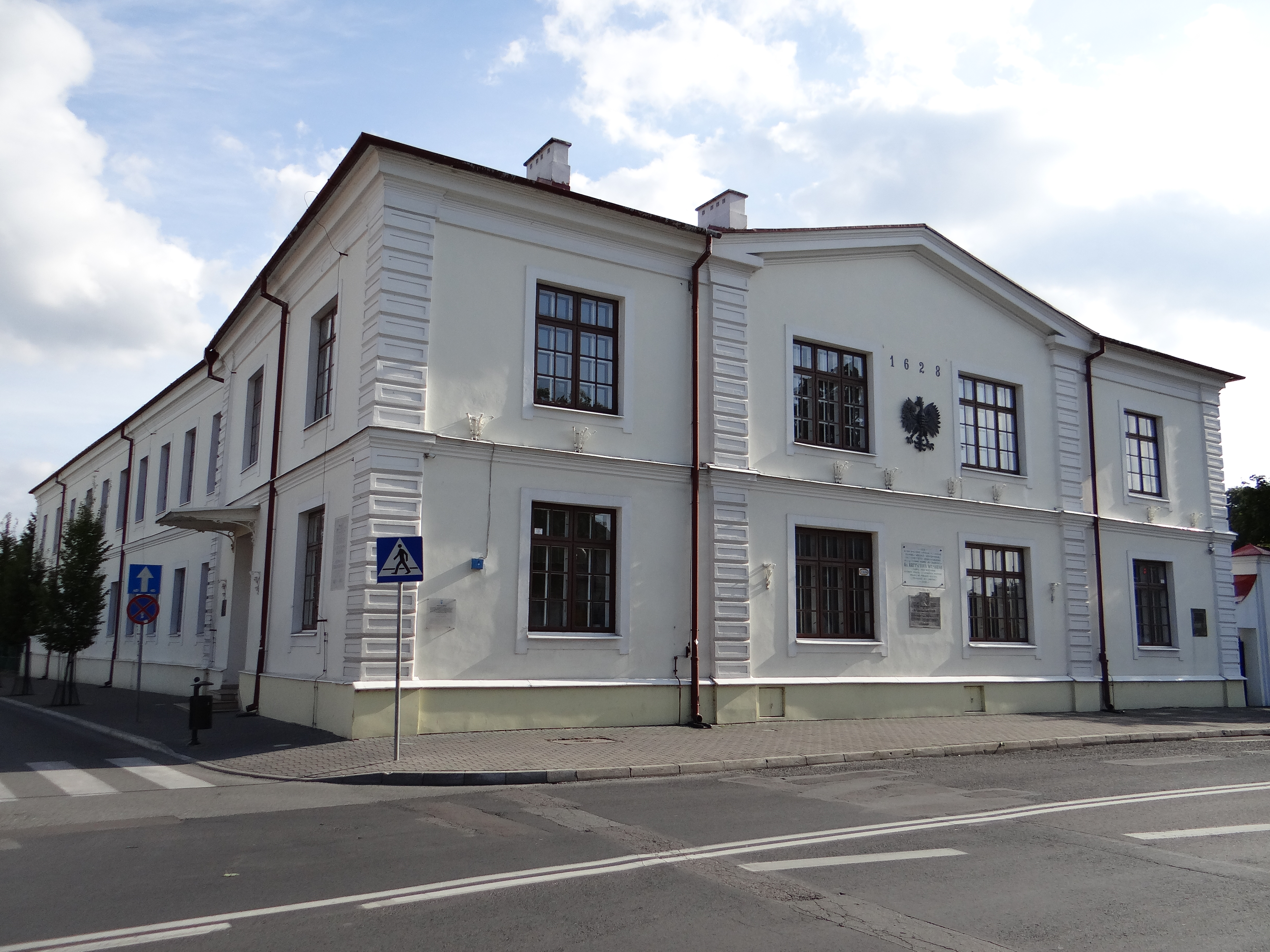 Akademia Bialska w Białej Podlaskiej